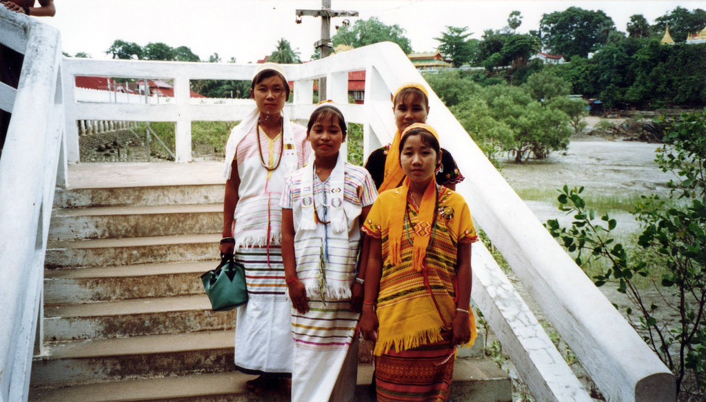 Karen (Kayin) women at the Kyaikkami Ye-Le Pagoda in Kyaikkami, Mon State